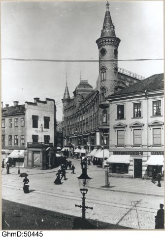 Arkaden, affärsbyggnad i Göteborg. Det första Arkaden-huset var en brunröd tegelbyggnad med tinnar och torn och färdigställdes i oktober 1899. Byggnaden ritades av arkitekten Frans Louis Enders och var tänkt att med valvbågar förbindas med en pendang på andra sidan den gata, "Arkaden", som drogs snett genom kvarteret. Någon egentlig arkad blev det dock aldrig, eftersom något valv som skapade en båggång inte byggdes.